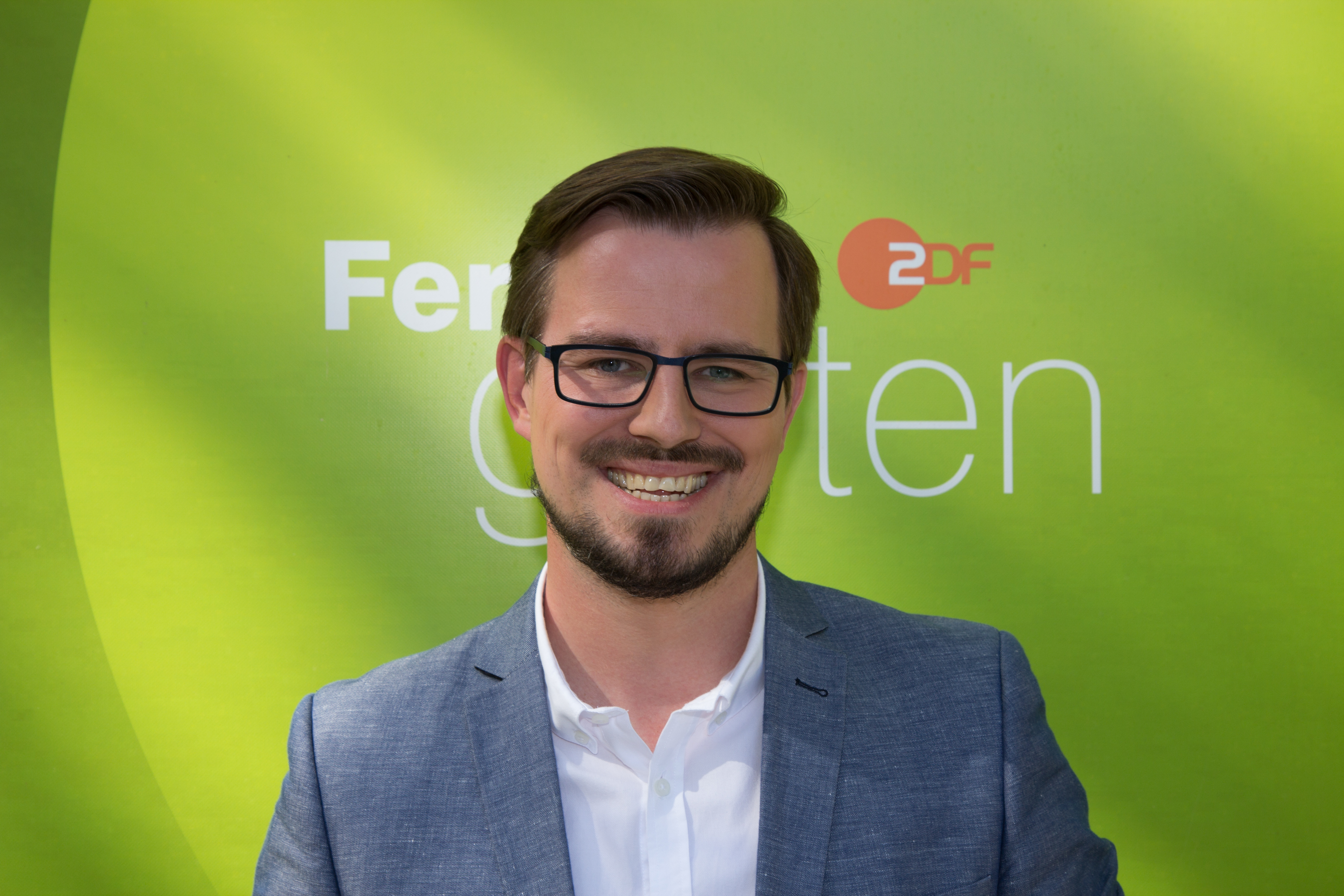 Boris Konrad als Gast im ZDF-Fernsehgarten am 16. September 2018 in Mainz.